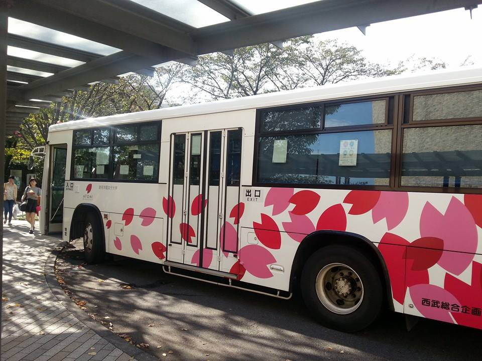 跡見学園女子大学運行の学バス